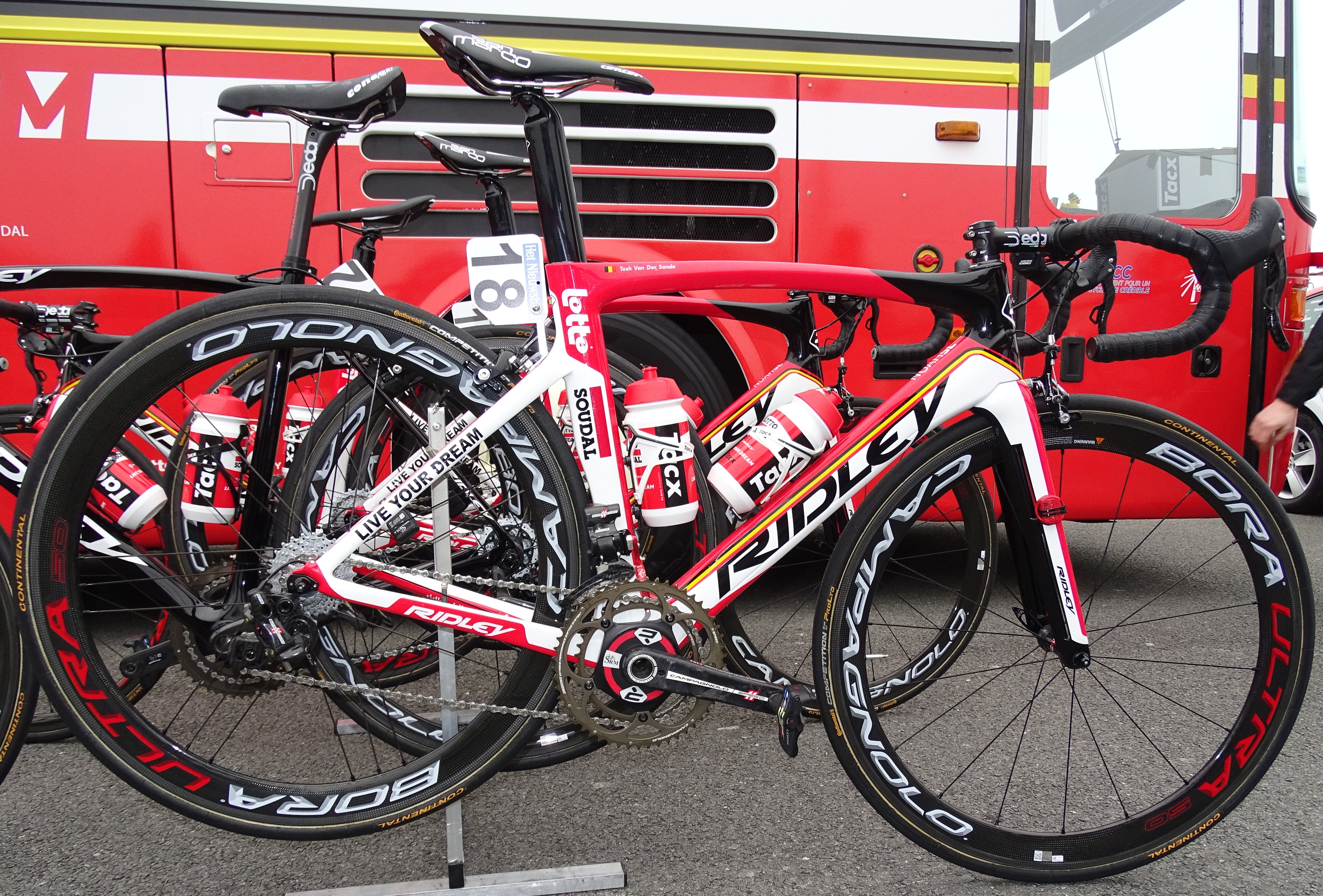 Reportage réalisé le vendredi 20 mars à l'occasion du départ de la Handzame Classic 2015 à Bredene, Belgique.